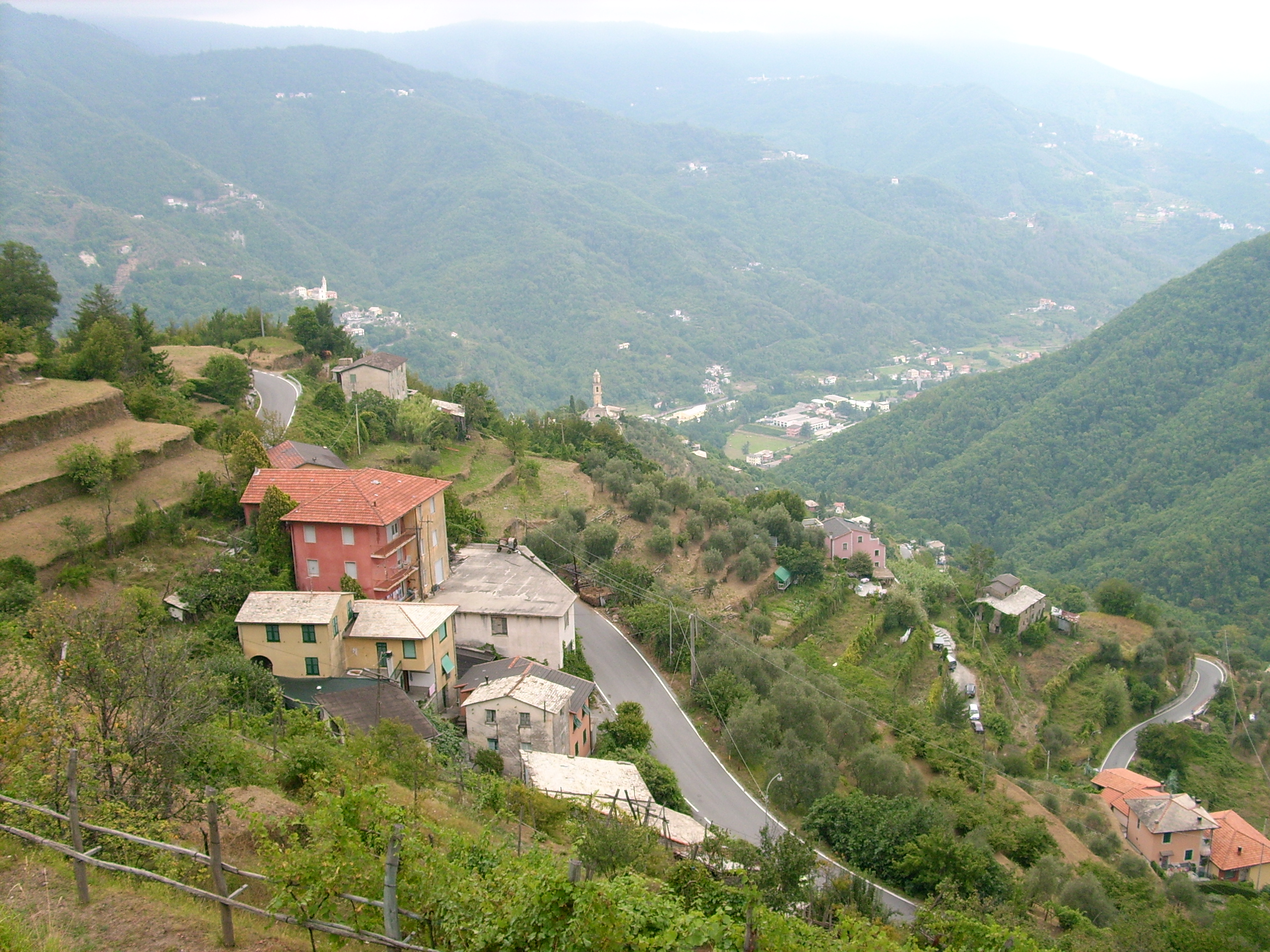 Panorama di Coreglia Ligure, Liguria, Italia